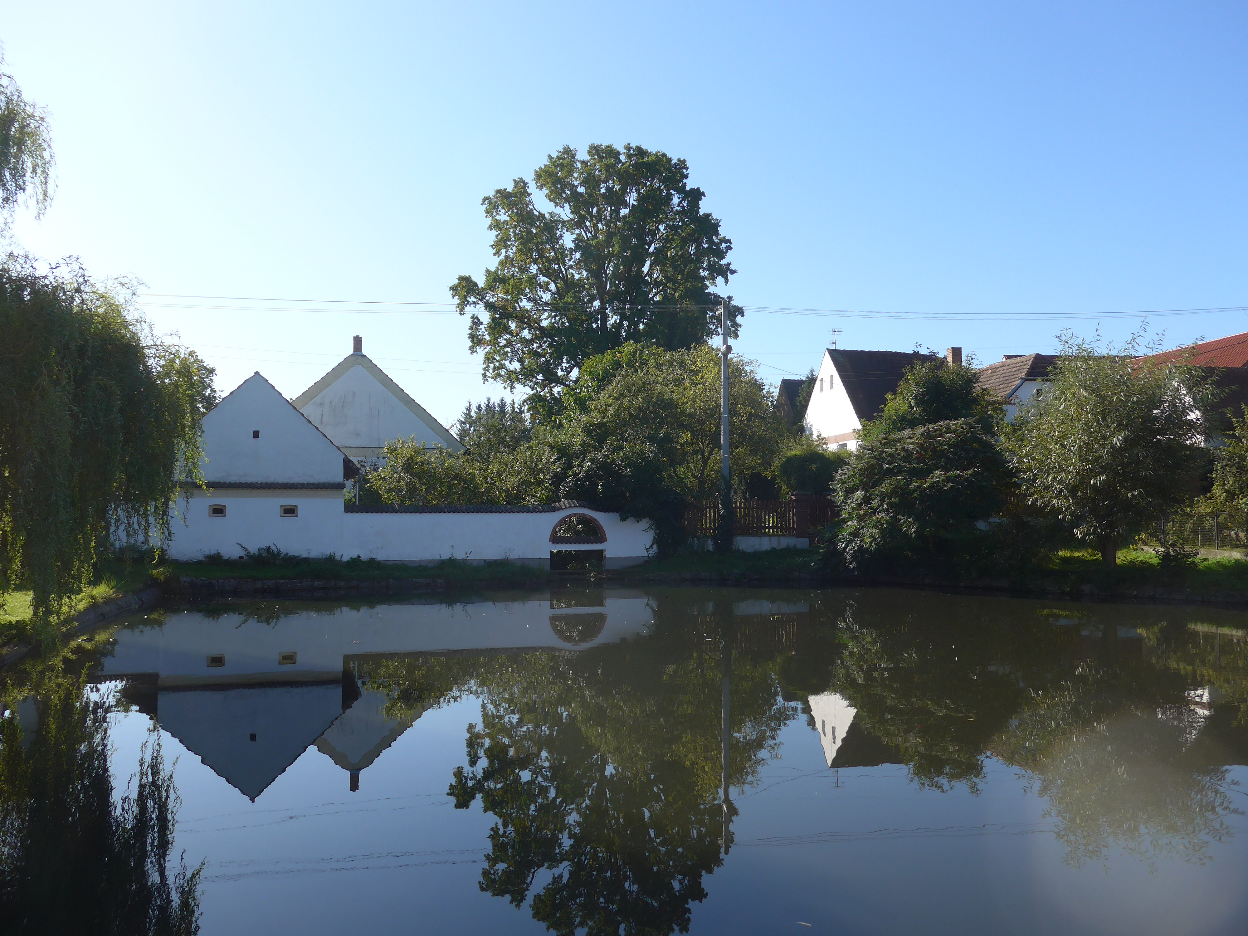 Hrází prochází hlavní místní komunikace